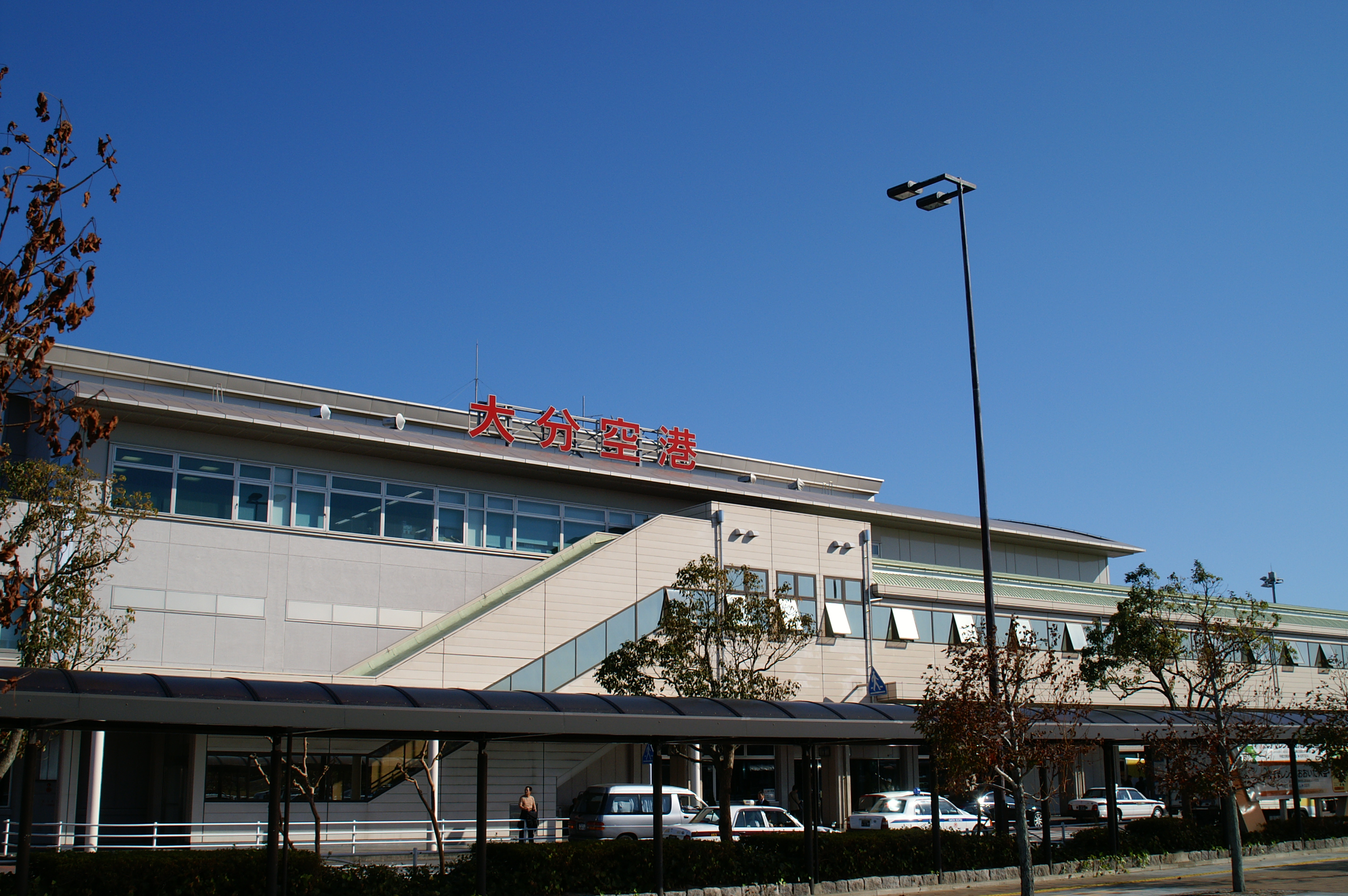 大分空港 (OIT/RJFO) の国内線ターミナル。 (2006/11/09 Oita Airport, Kunisaki, Oita, JAPAN)